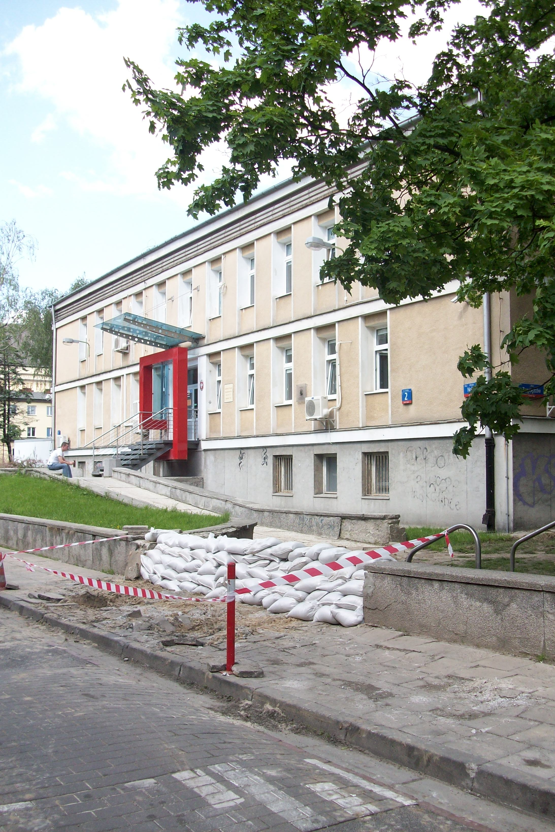 Regionalne Centrum Krwiodawstwa i Krwiolecznictwa na Saskiej Kępie w Warszawie - widok od strony ul. Alfreda Nobla. Widoczne zabezpieczenia przeciwpowodziowe.